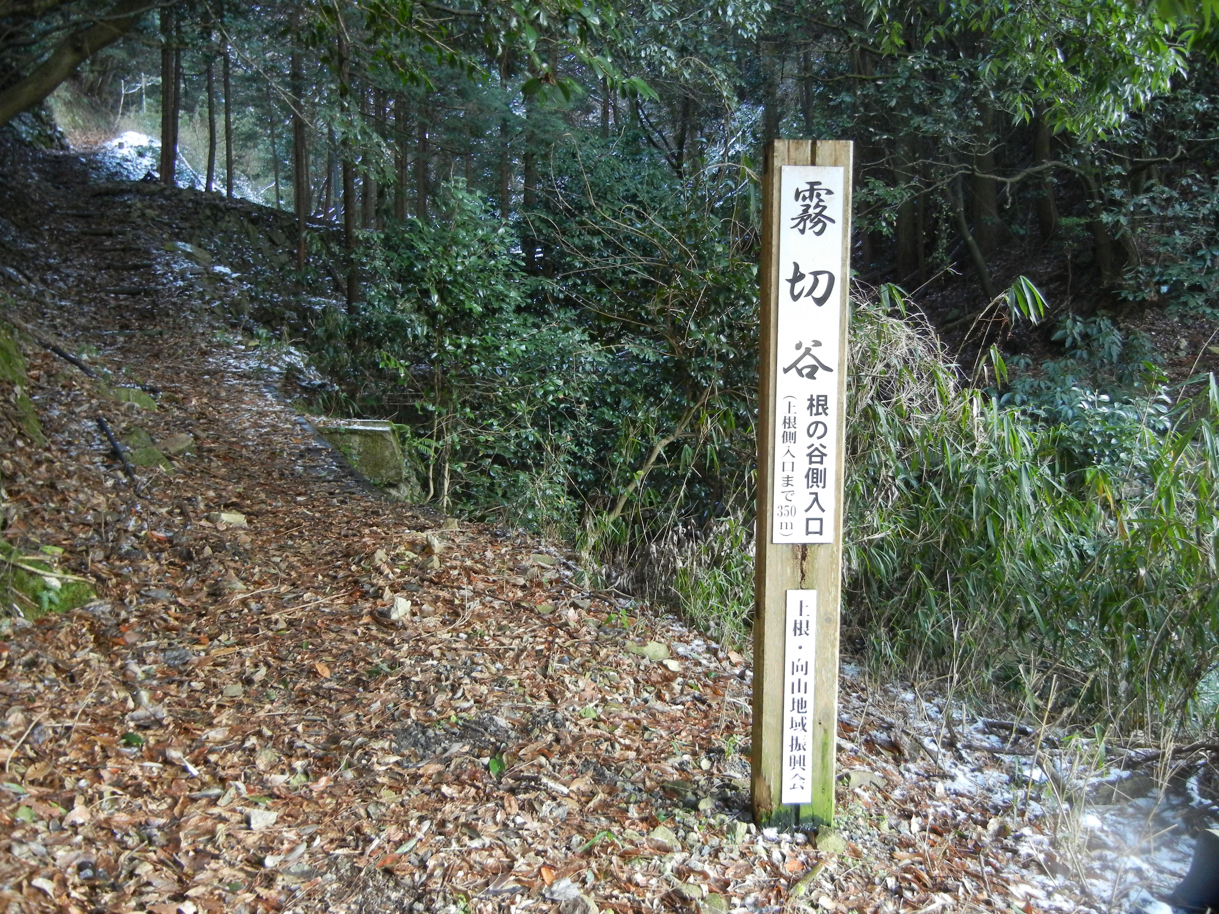 霧切谷（キリキリ谷）根の谷側入口